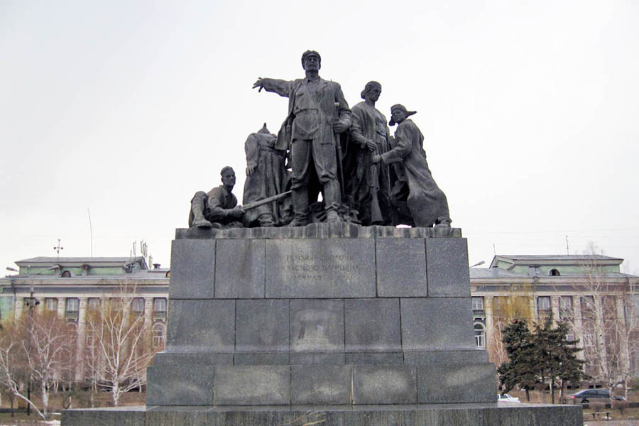 Памятник героям обороны Красного Царицына в Волгограде